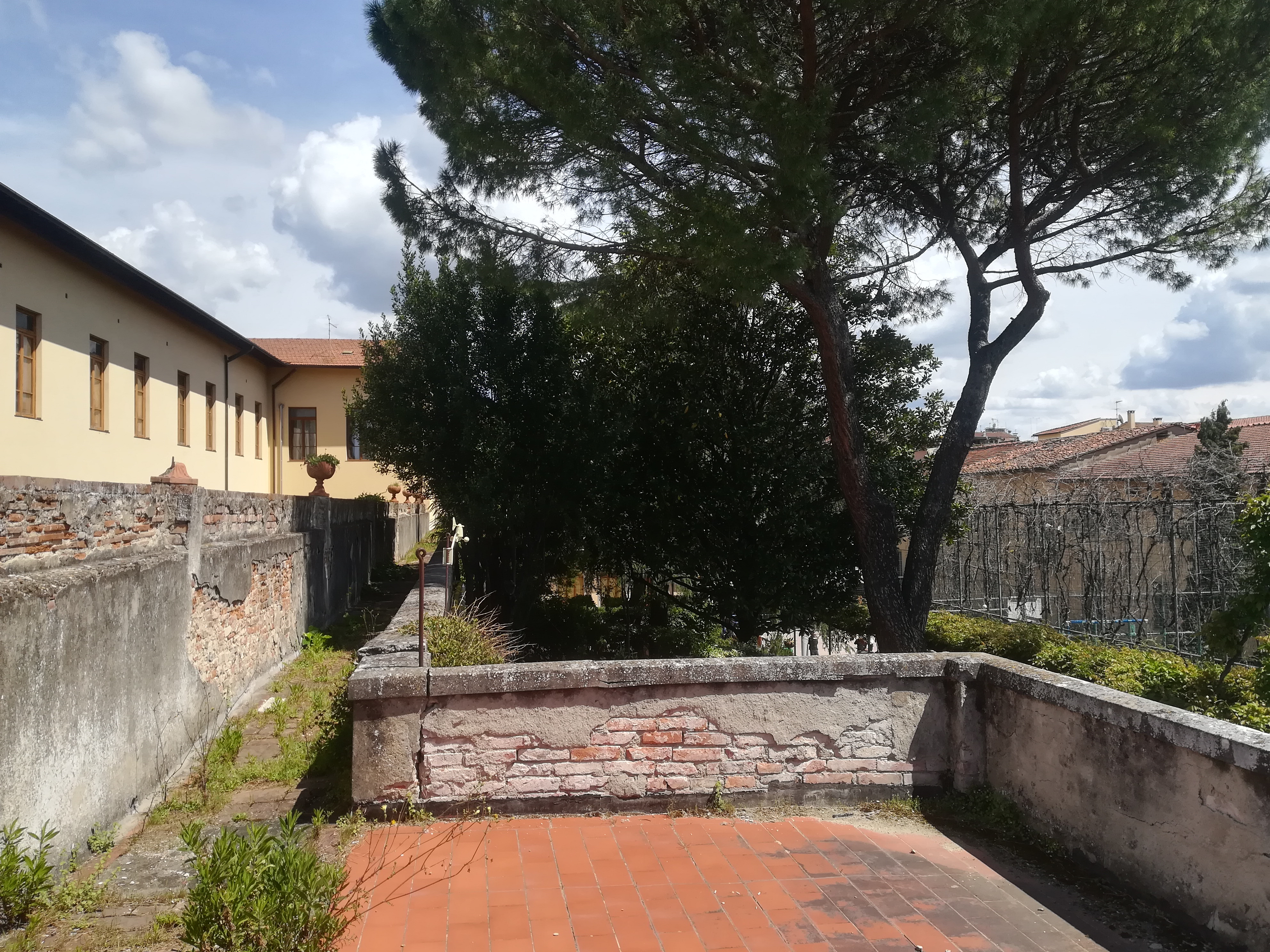 Parte di cinta muraria empolese su cui si appoggia il Conservatorio SS.ma Annunziata.